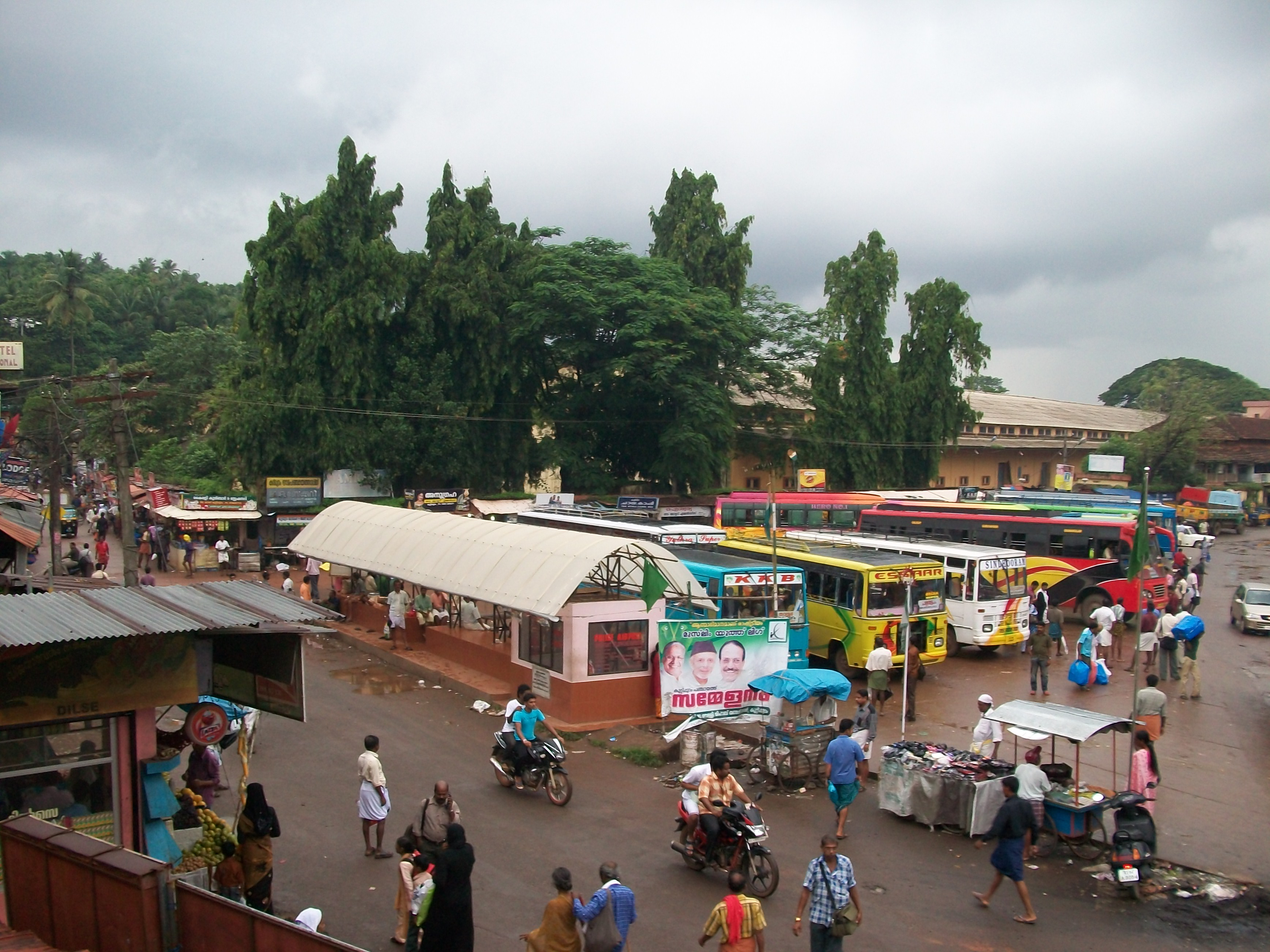 കുറ്റിപ്പുറം ബസ്റ്റാന്റിന്റെ ഒരു ദൃശ്യം